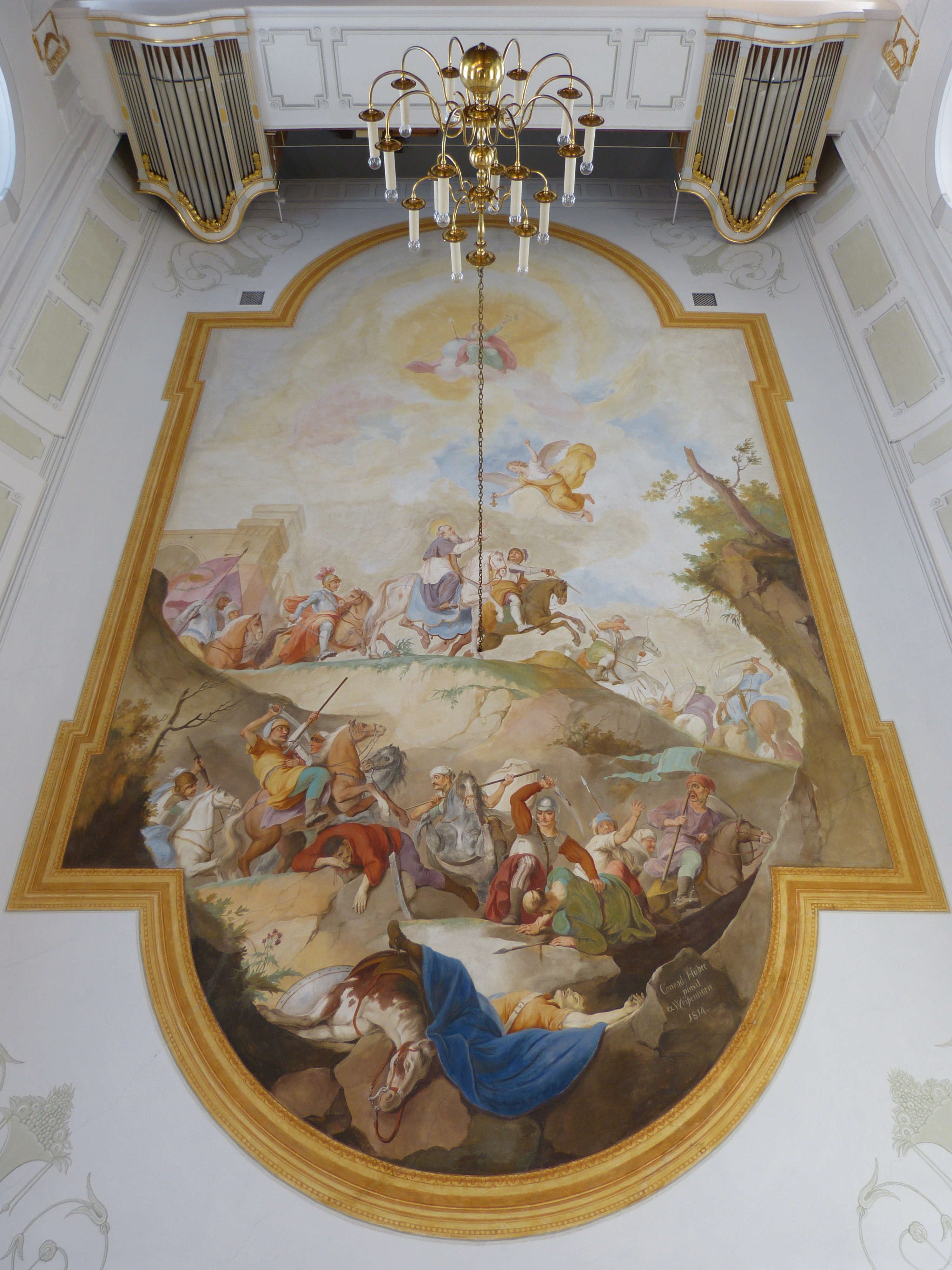 St. Ulrich, Ollarzried, Landkreis Unterallgäu, Bayern